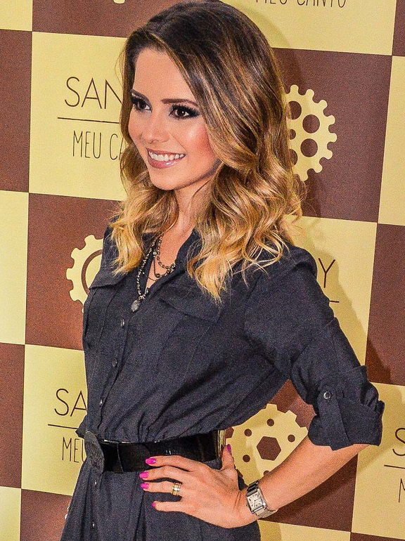 Sandy no show da estreia da Turnê Meu Canto em maio de 2016.